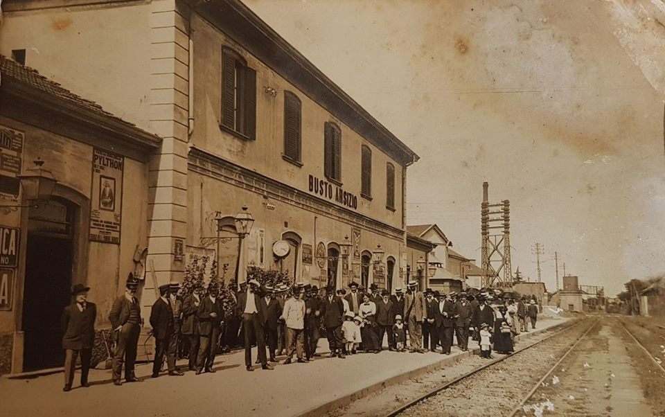 La vecchia stazione di Busto Arsizio FN negli anni 1920. Fu demolita nel 1991.